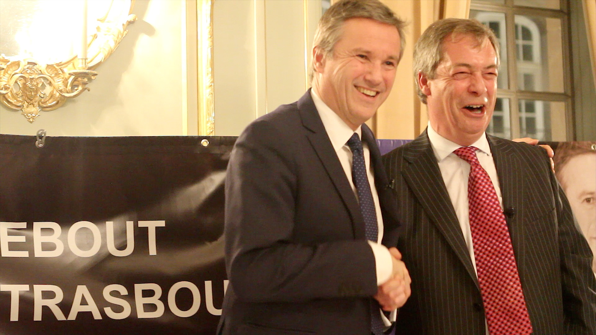 Nicolas Dupont-Aignan et Nigel Farage à Strasbourg (06/12/2013)